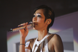 中文（香港）: 903飛馳中的音樂會。